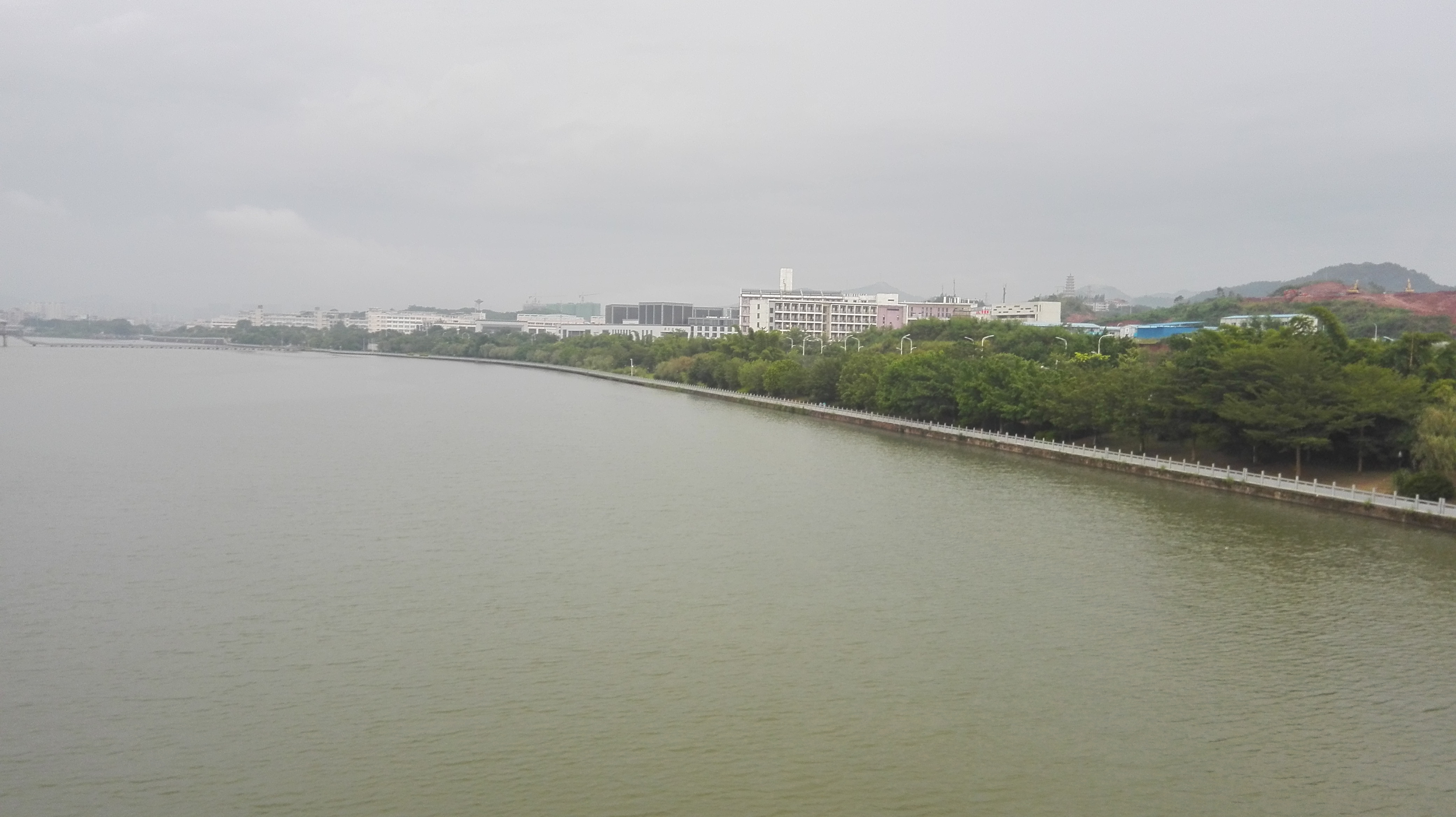 梅江河书山路段，对面即为东山中学及院士广场，摄于桥上